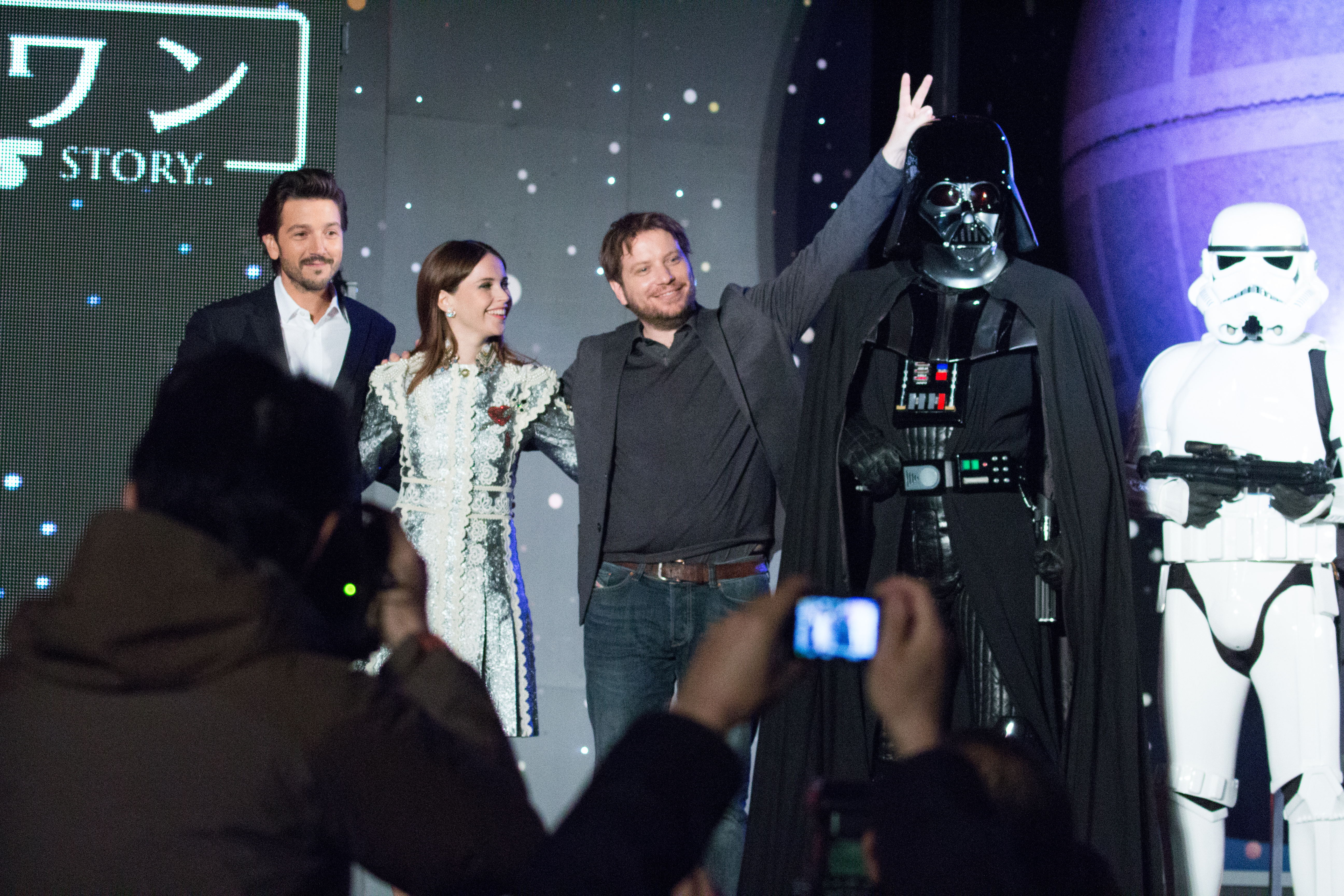 ローグ・ワン/スター・ウォーズ・ストーリー ジャパン・プレミア レッドカーペット ディエゴ・ルナ フェリシティ・ジョーンズ ギャレス・エドワーズ